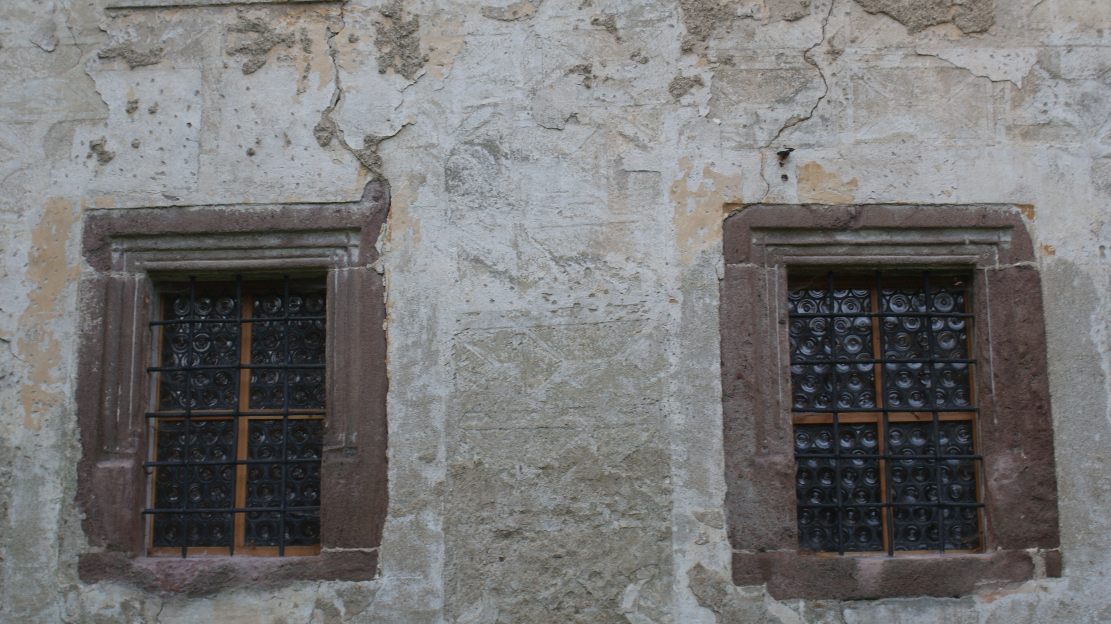 Vodní tvrz Popovice (okres Benešov) Pohled na okna rizalitu severního křídla.